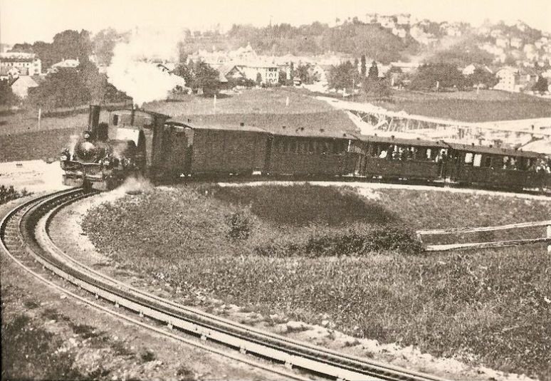 HG 2/3 1 der Appenzeller-Strassenbahn (ASt) in der Ruckhaldenkurve ob St. Gallen